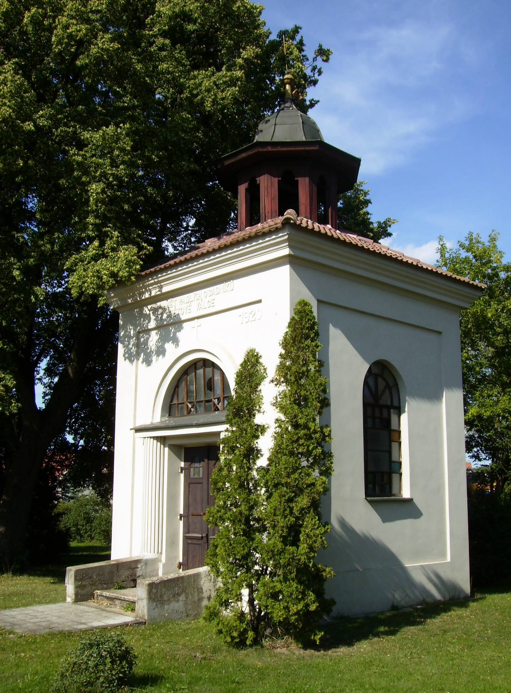 Kaple připomínající padlé ve vesnici Hradištko na Nymbursku, Středočeský kraj.